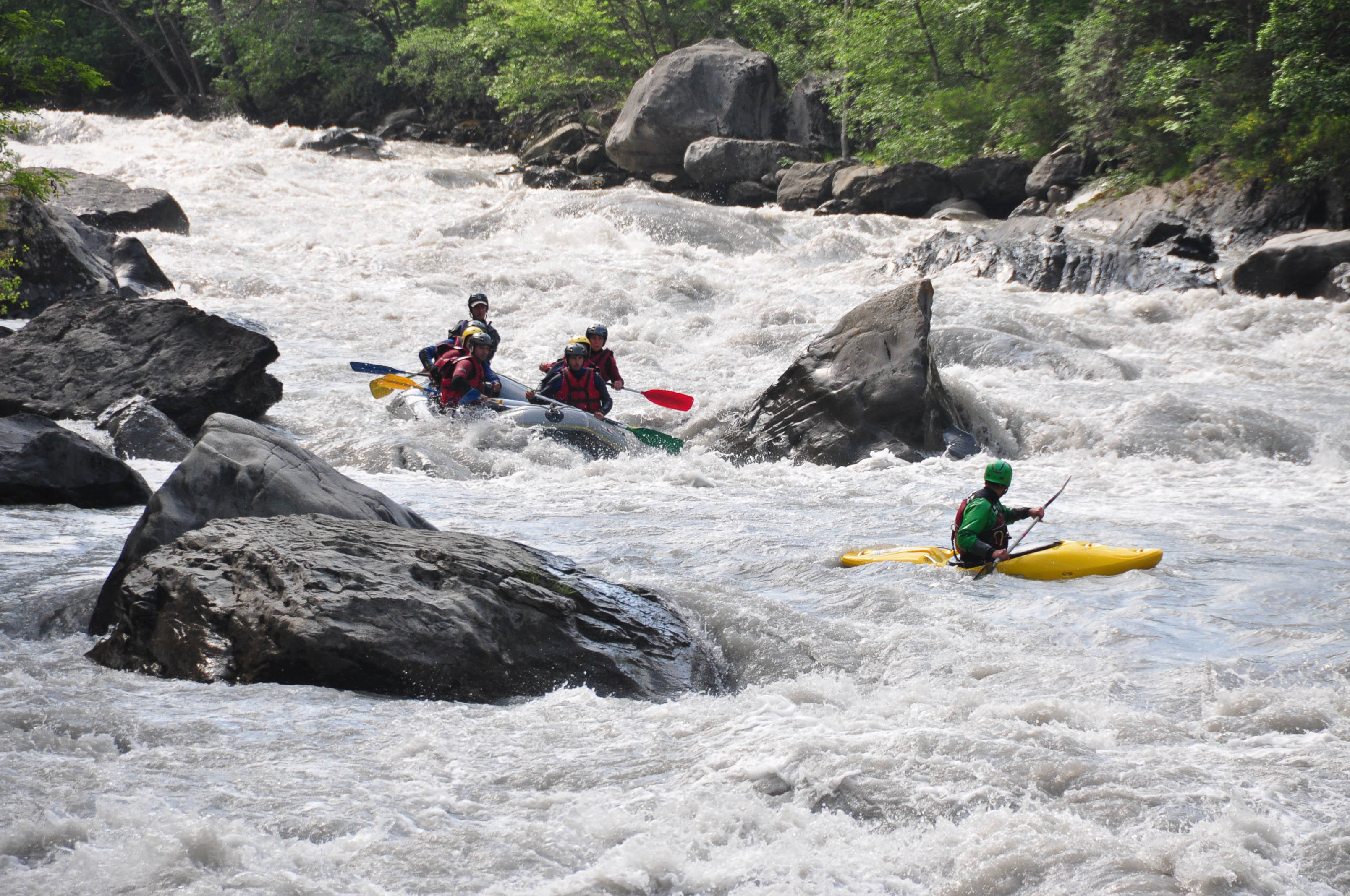 Descente du torrent